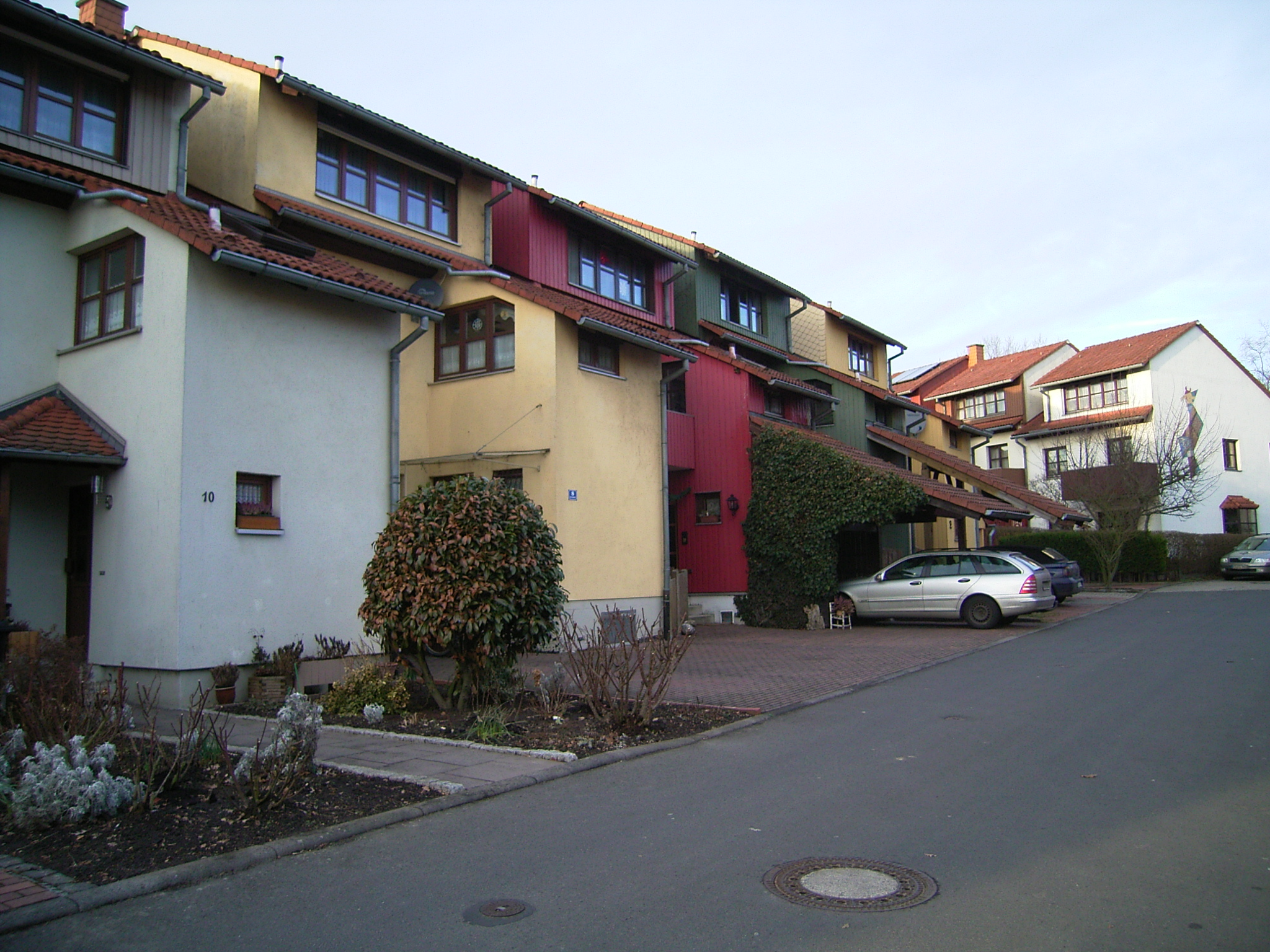 documenta urbana Wohngebäude in Kassel 1979-1982. Reihenhäuser von Johannes Olivegren